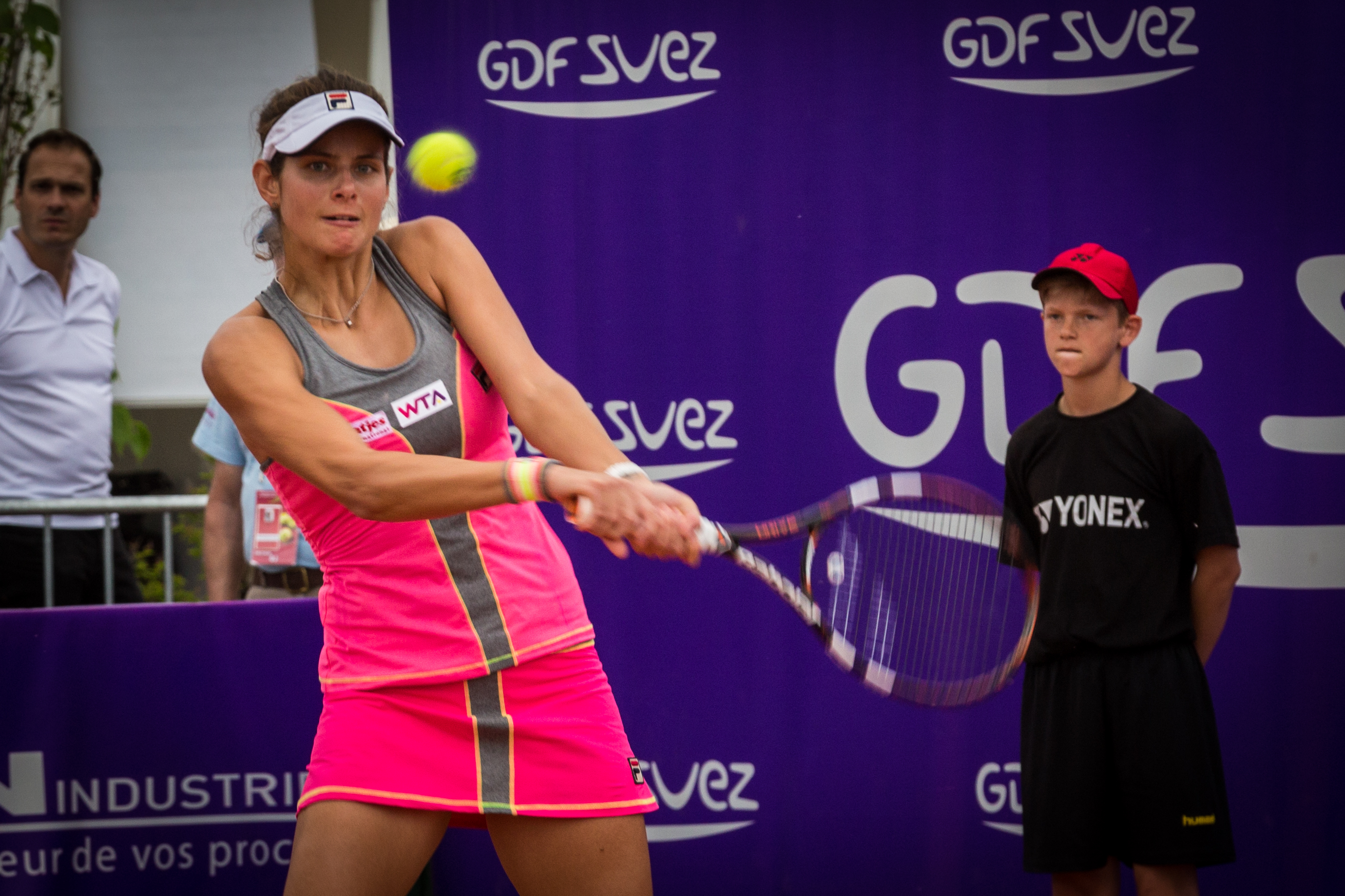 Julia Görges, née le 2 novembre 1988 à Bad Oldesloe, est une joueuse de tennis allemande professionnelle depuis 2005.